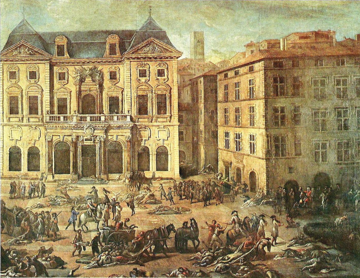 Tableau de Michel Serre (1658-1733) représentant l'hôtel de ville de Marseille pendant la peste de 1720.